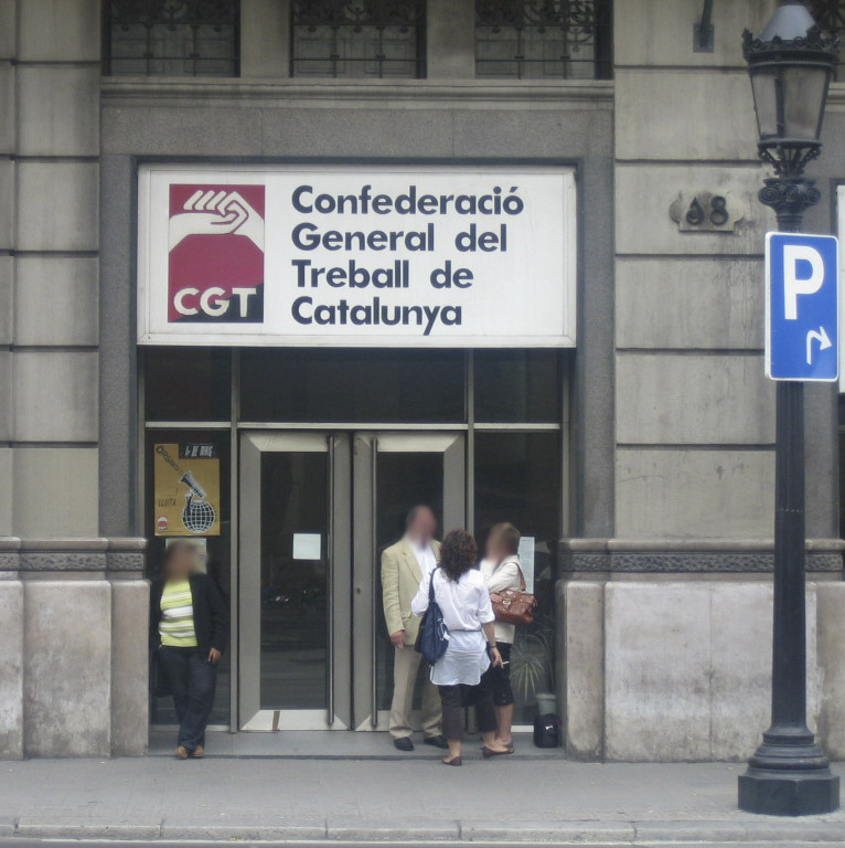 CGT Cataluña (España)